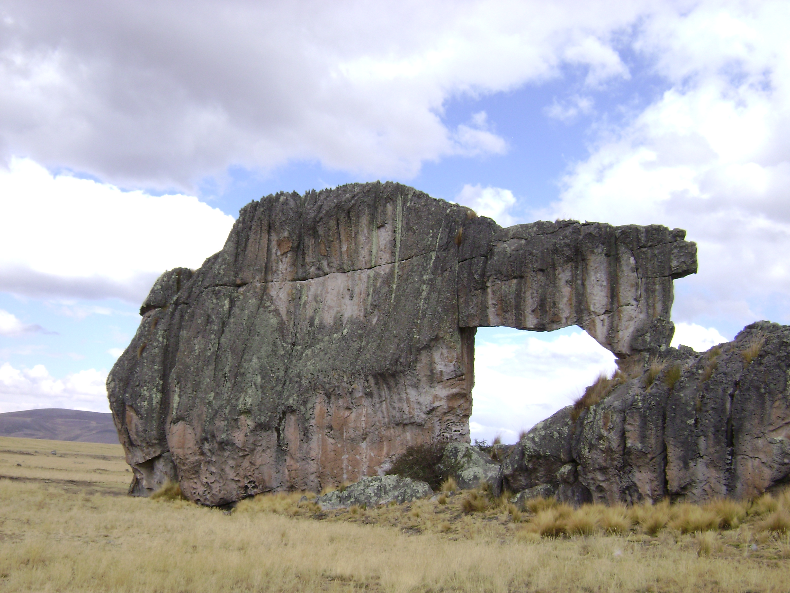 BP_Alpaca